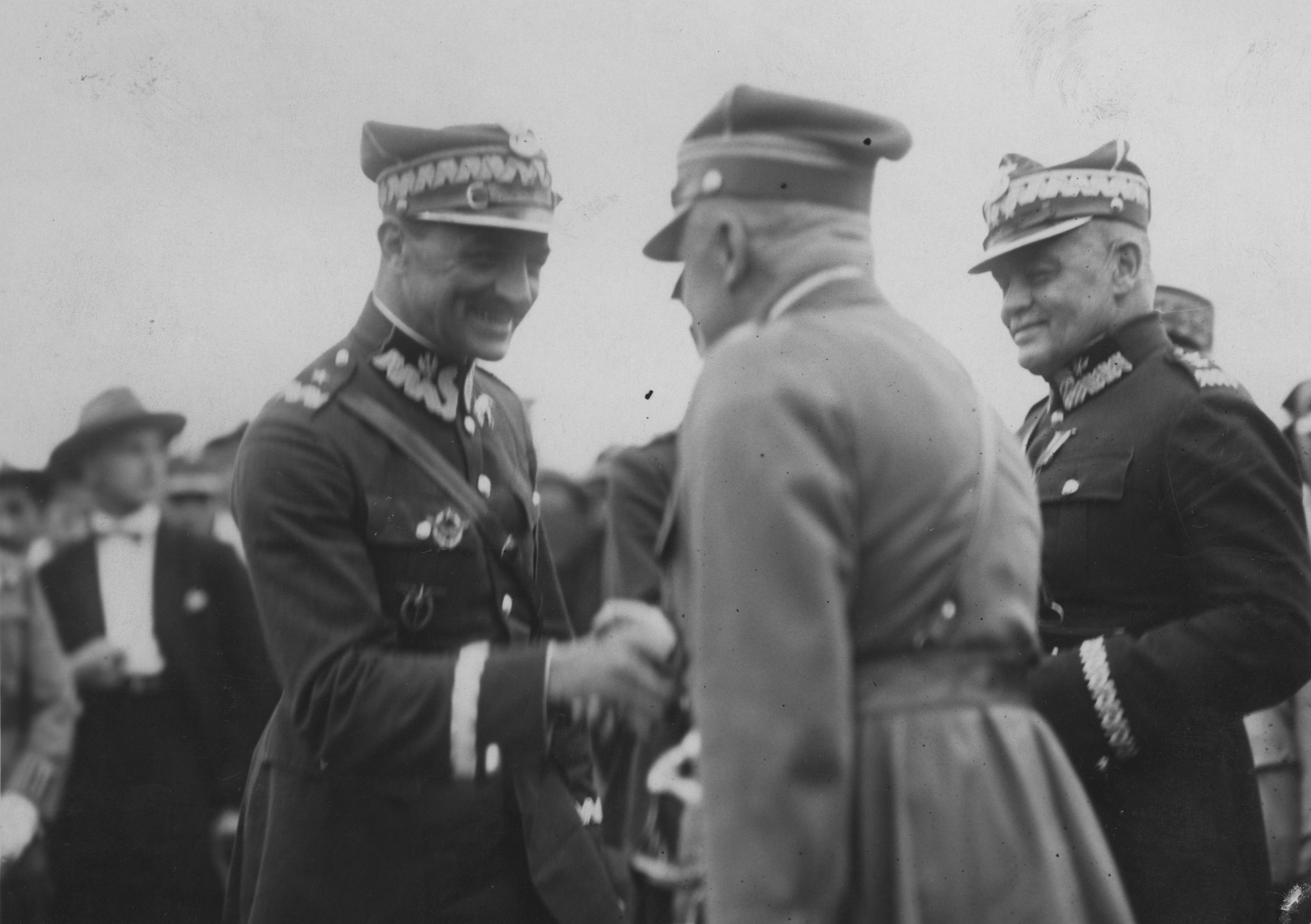 Powitanie polskich lotników wojskowych po powrocie z wizyty w Hiszpanii do Warszawy. Widoczny generał Włodzimierz Zagórski.